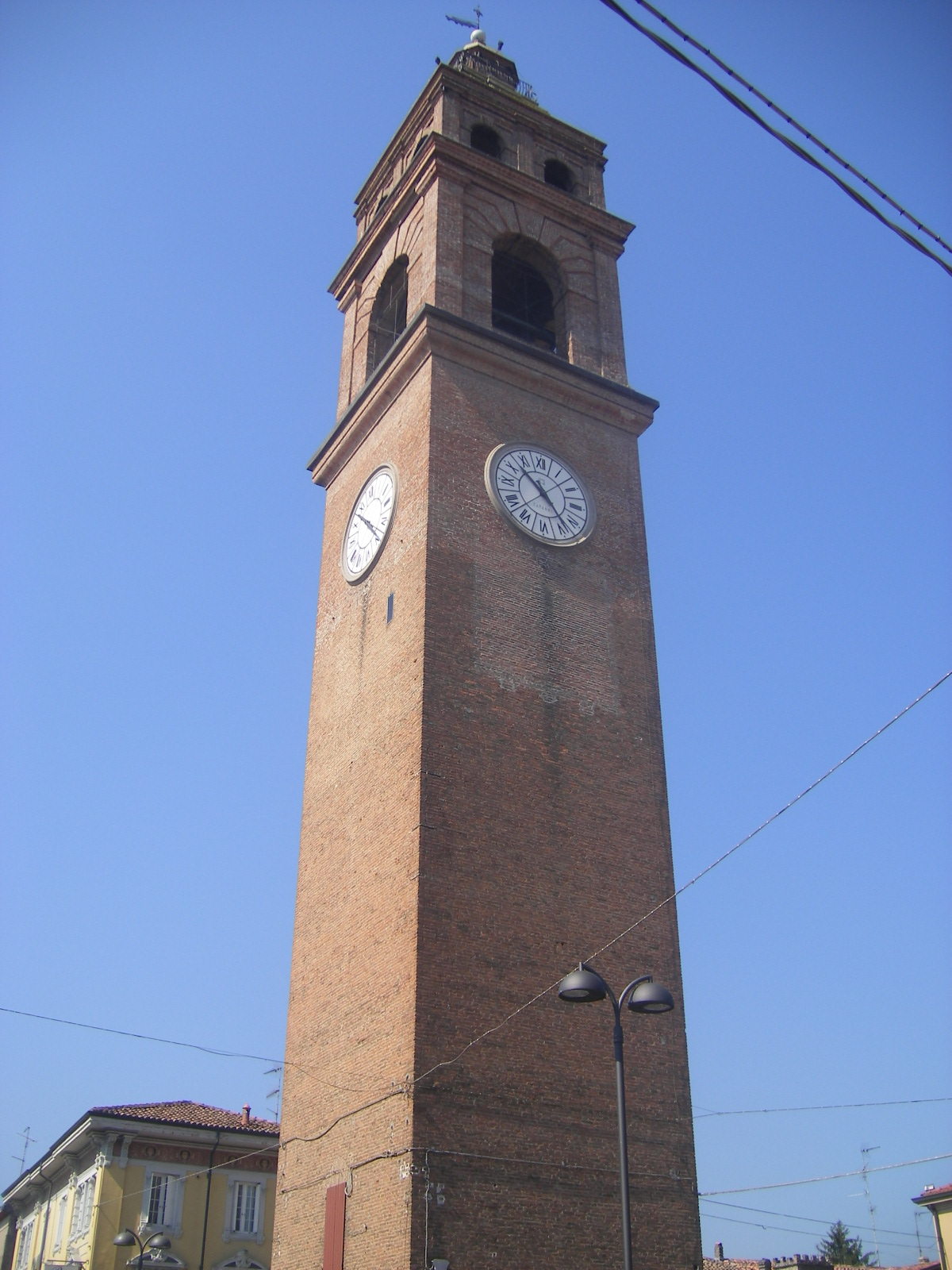 Luzzara